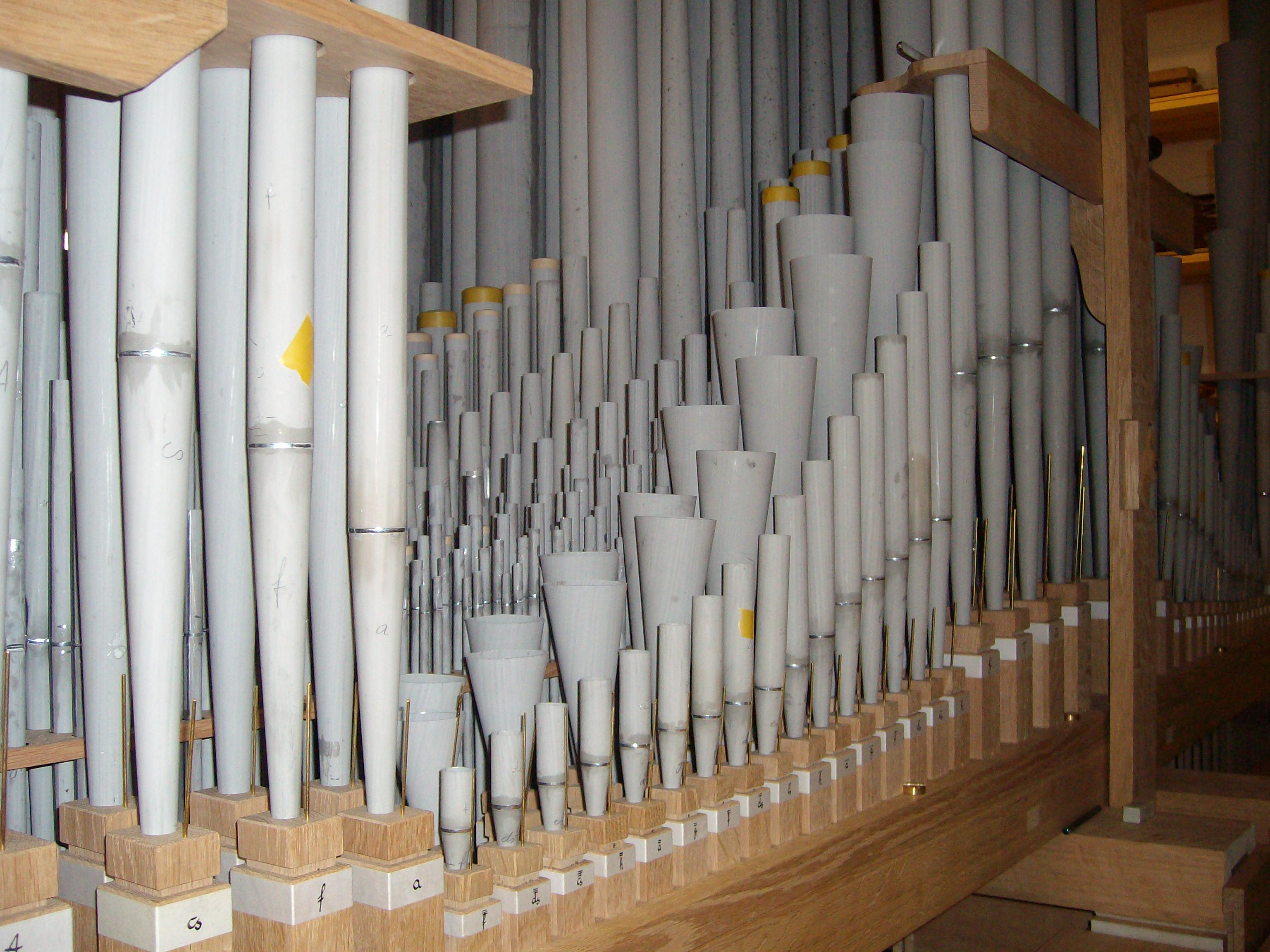 Orgel für die Zionskirche in Worpswede während des Neubaus in der Werkstatt Ahrend